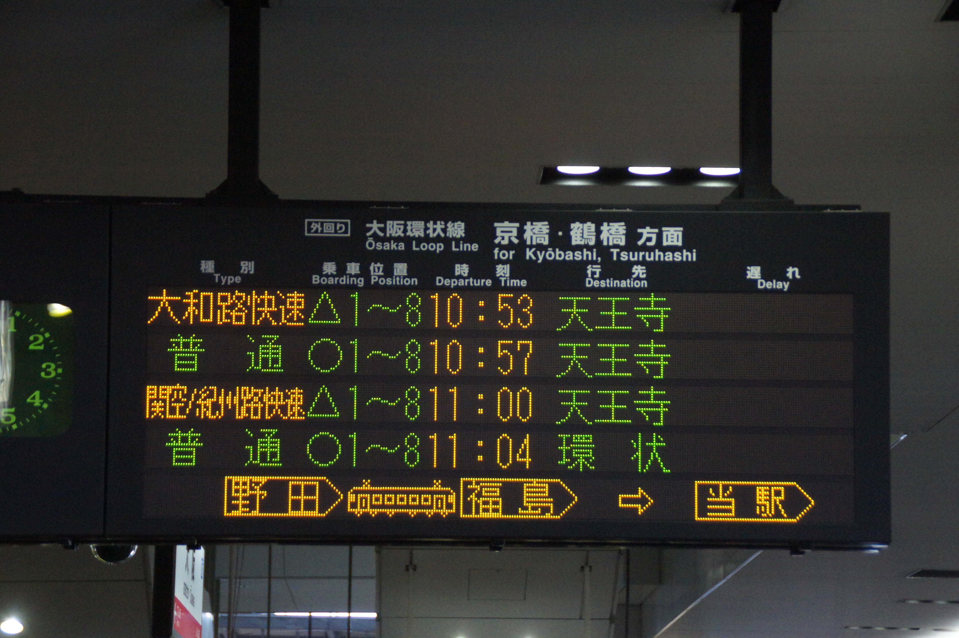 大阪駅発車標